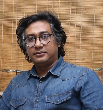 আর্কএশিয়া এওয়ার্ড ২০১৮ প্রাপ্ত বাংলাদেশী স্থপতি